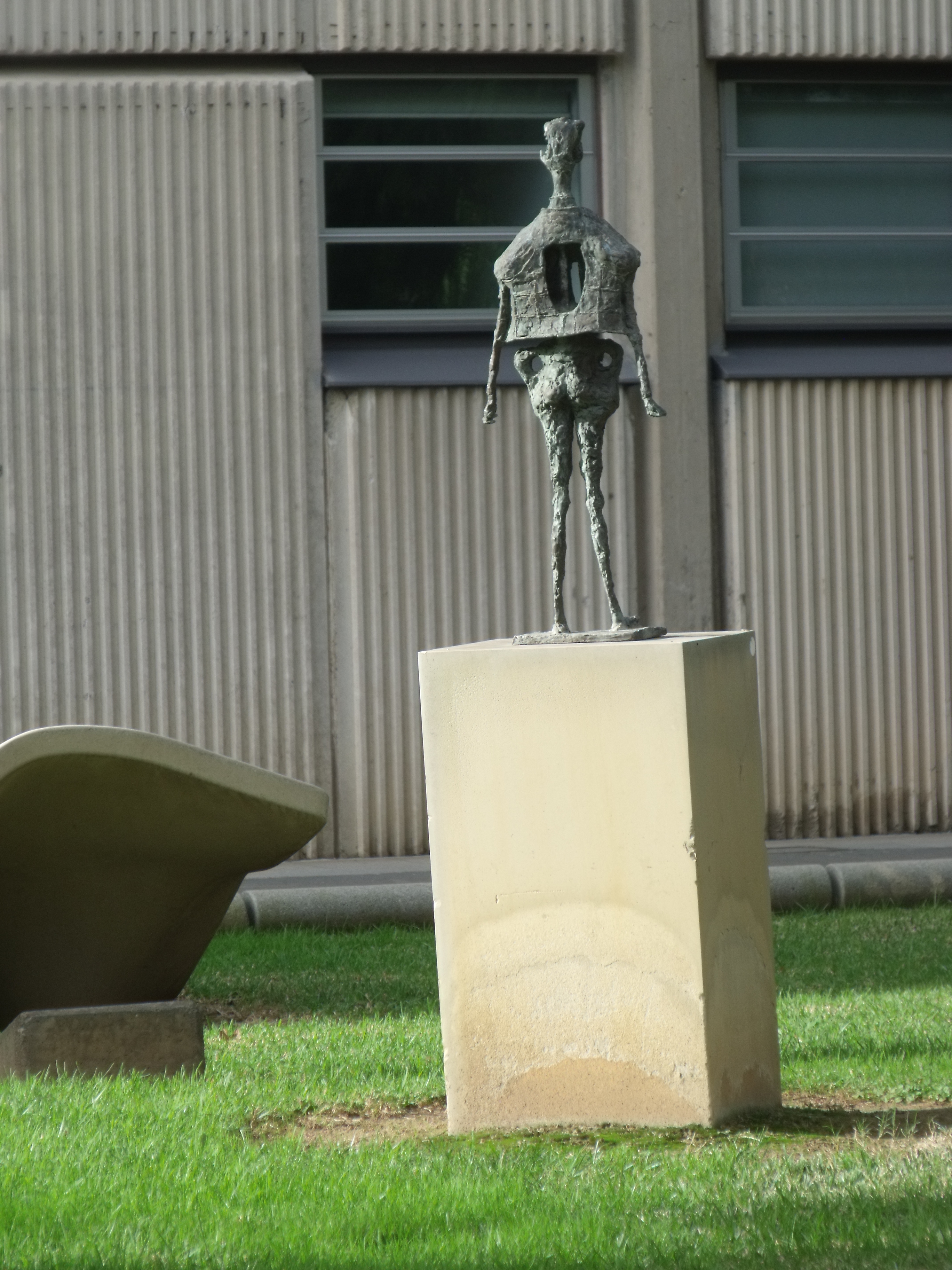 Escultura Torero, Francisco Badía, 1972